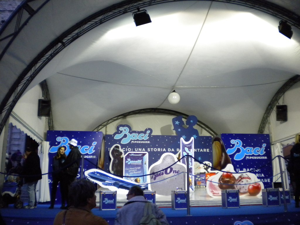 Stand Baci Perugina, Eurochocolate 2010, Perugia, Italia